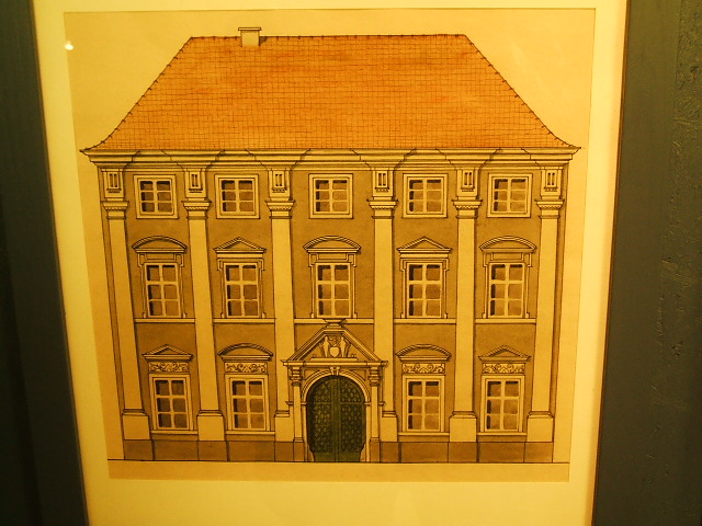 Ehemaliges Wrangelsches Palais in Stralsund, Exponat im Kulturhistorischen Mseum in Stralsund (Foto März 2007). Barockes Gebäude aus dem Jahre 1664 in der Heilgeiststraße 37.